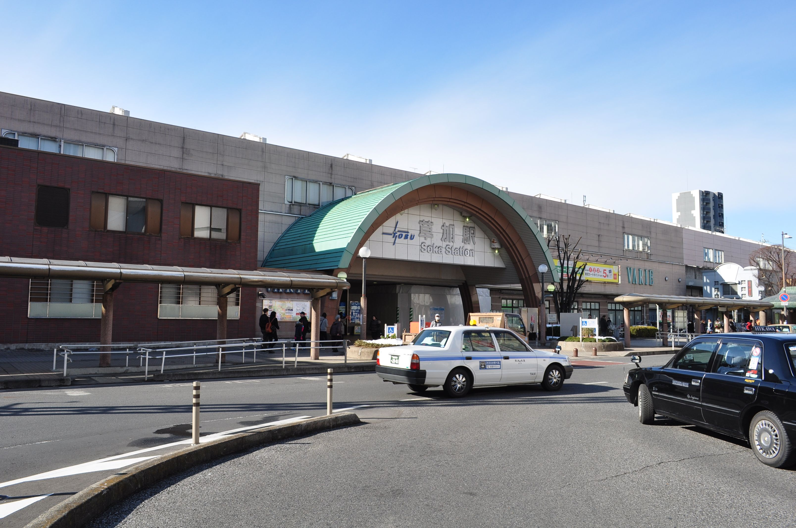 草加駅 駅舎